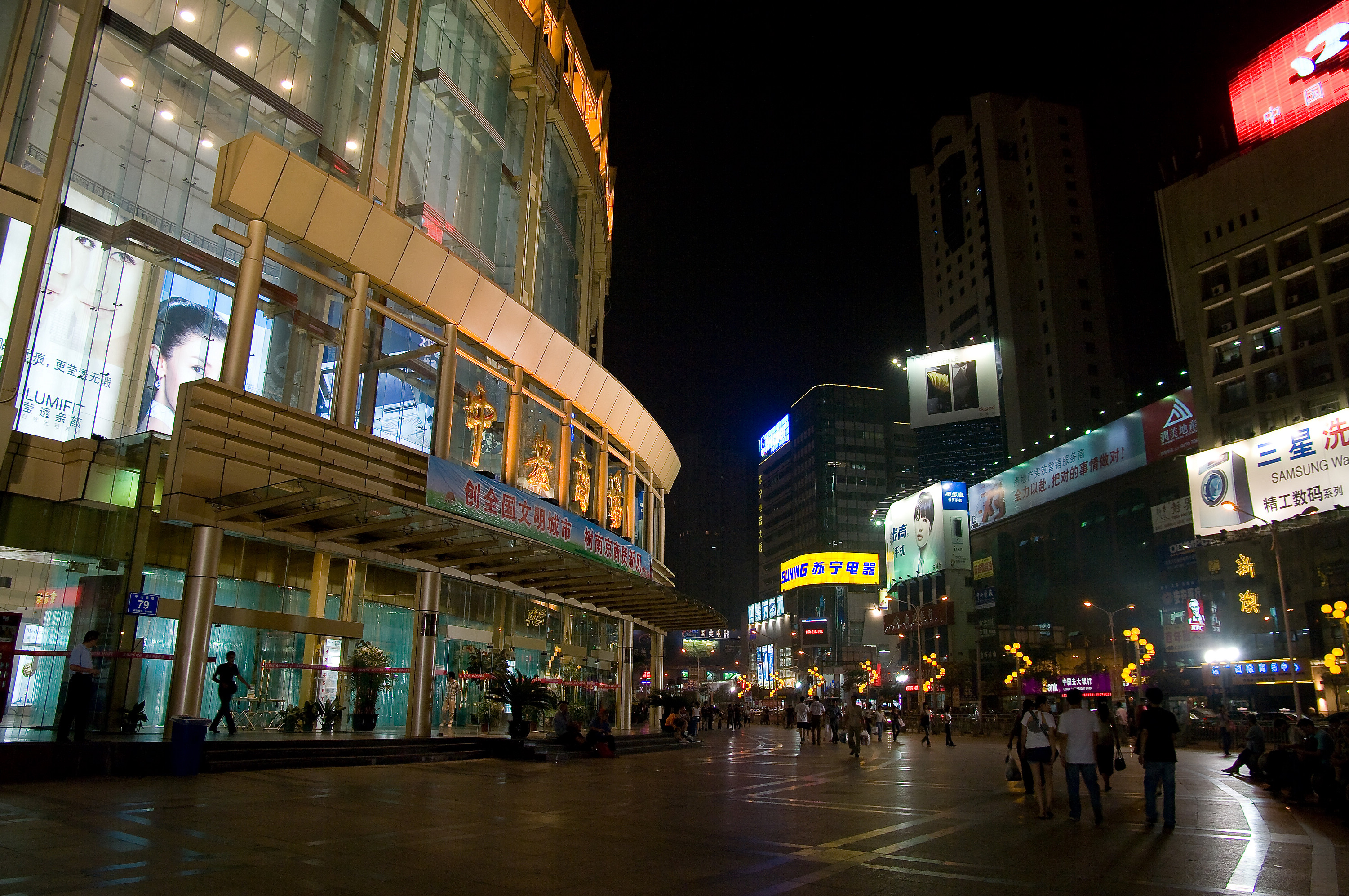 Nanjing Central Emporium